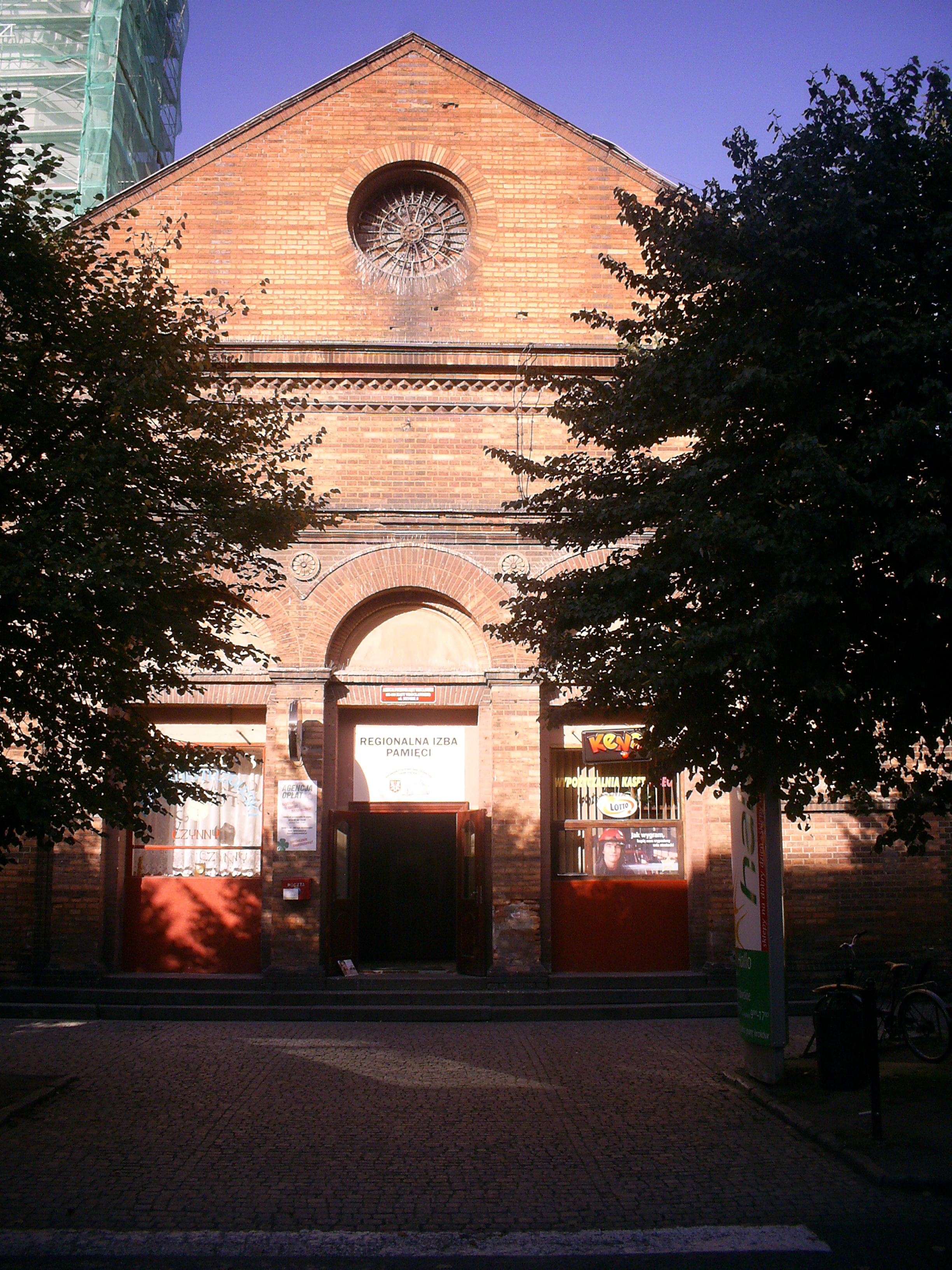 Kąty Wrocławskie, Rynek - dawny kościół ewangelicki św. Elżbiety, obecnie sklep / magazyn